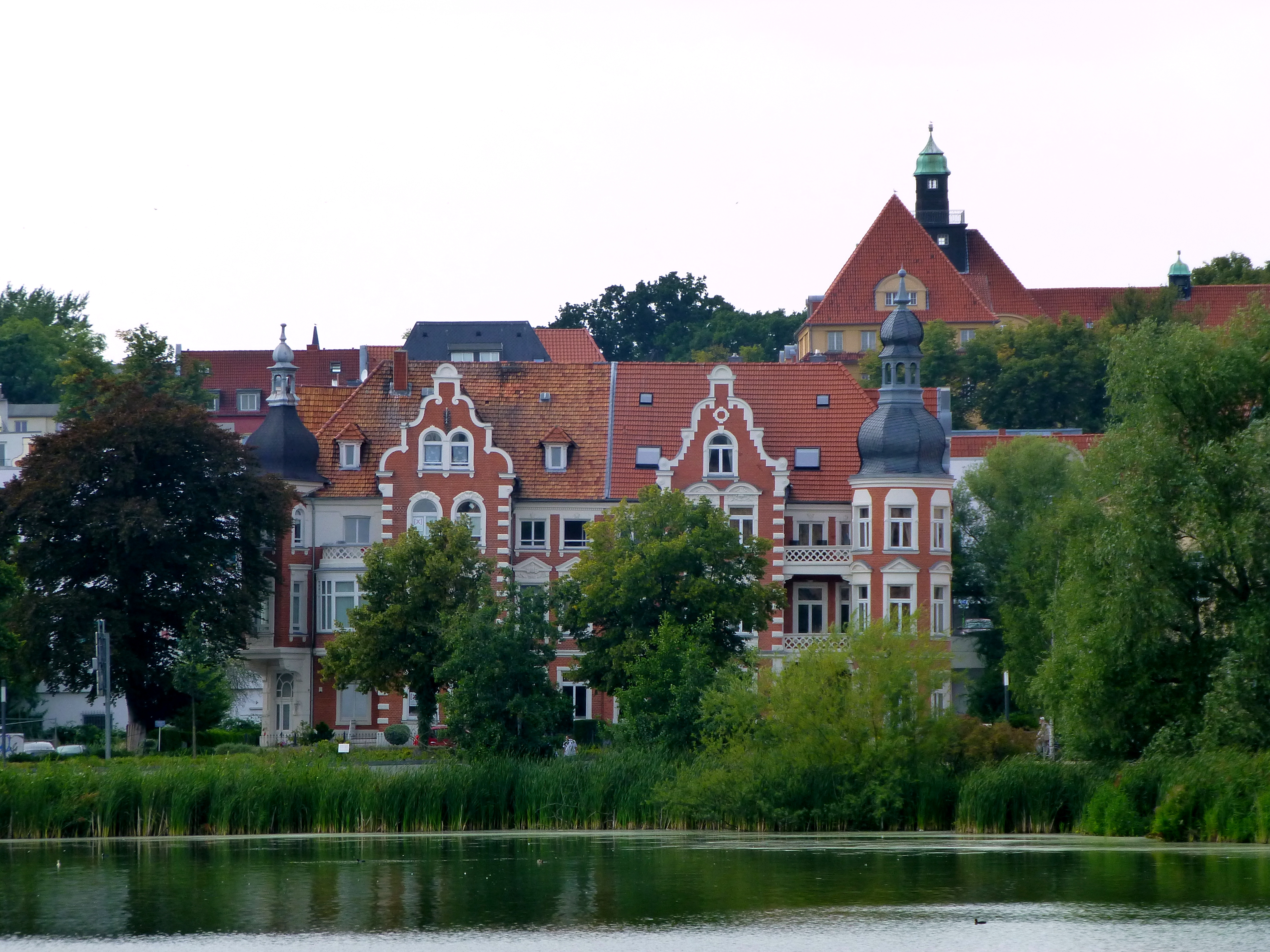 Schwerin - Graf-Schack-Allee